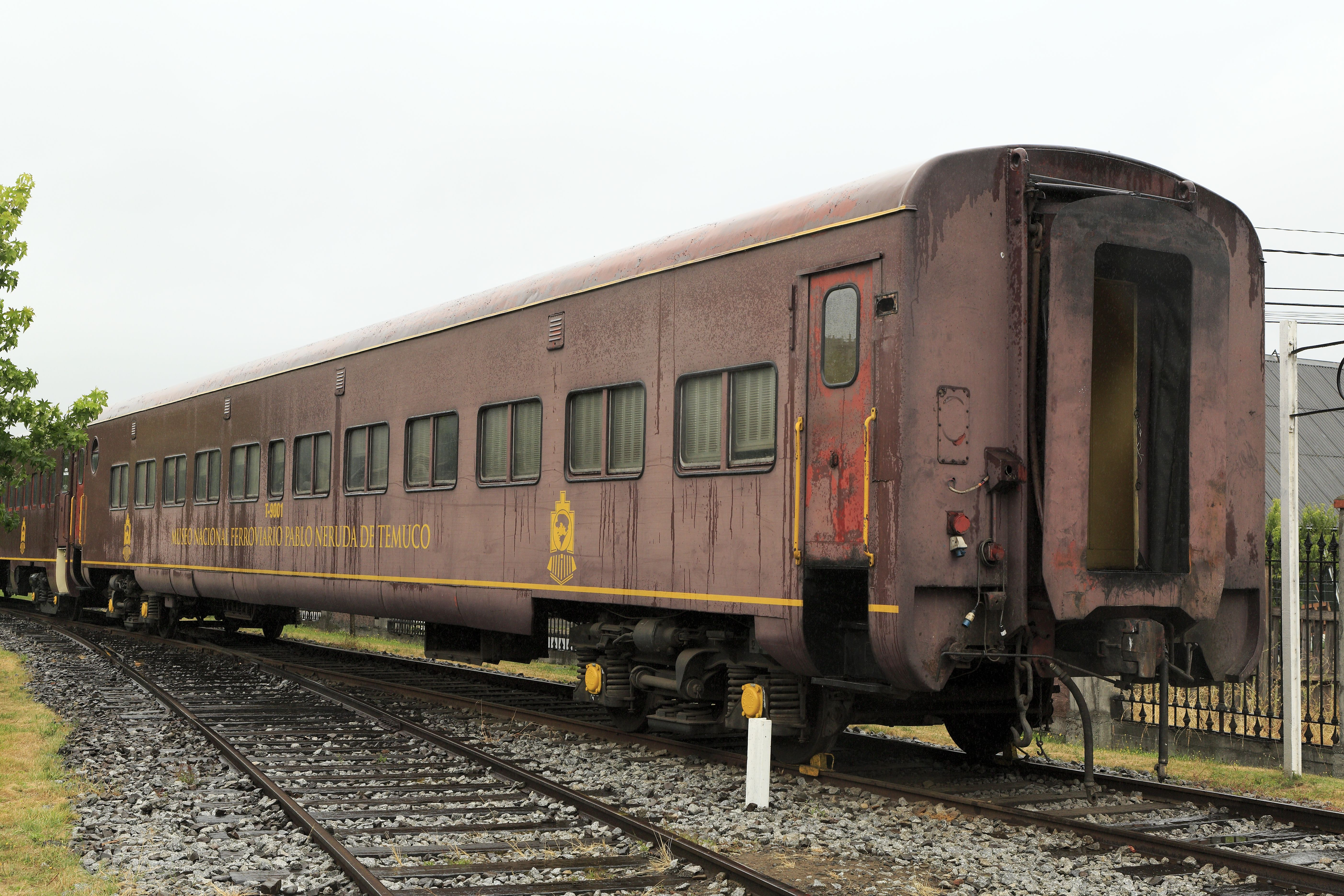 Reisezugwagen für Sonderfahrten aus sehr unterschiedlichen Baujahren. Der Vordere dürfte aus den späten 1950er oder frühen 1960er Jahren stammen. Er macht mit den glatten außenwänden und schraubengefederten Drehgestellen einen recht neuzeitlichen Eindruck, doch gibt es noch keine Gummiwulstübergänge und erstaunlicherweise auch keine Zugheizanschlüsse.